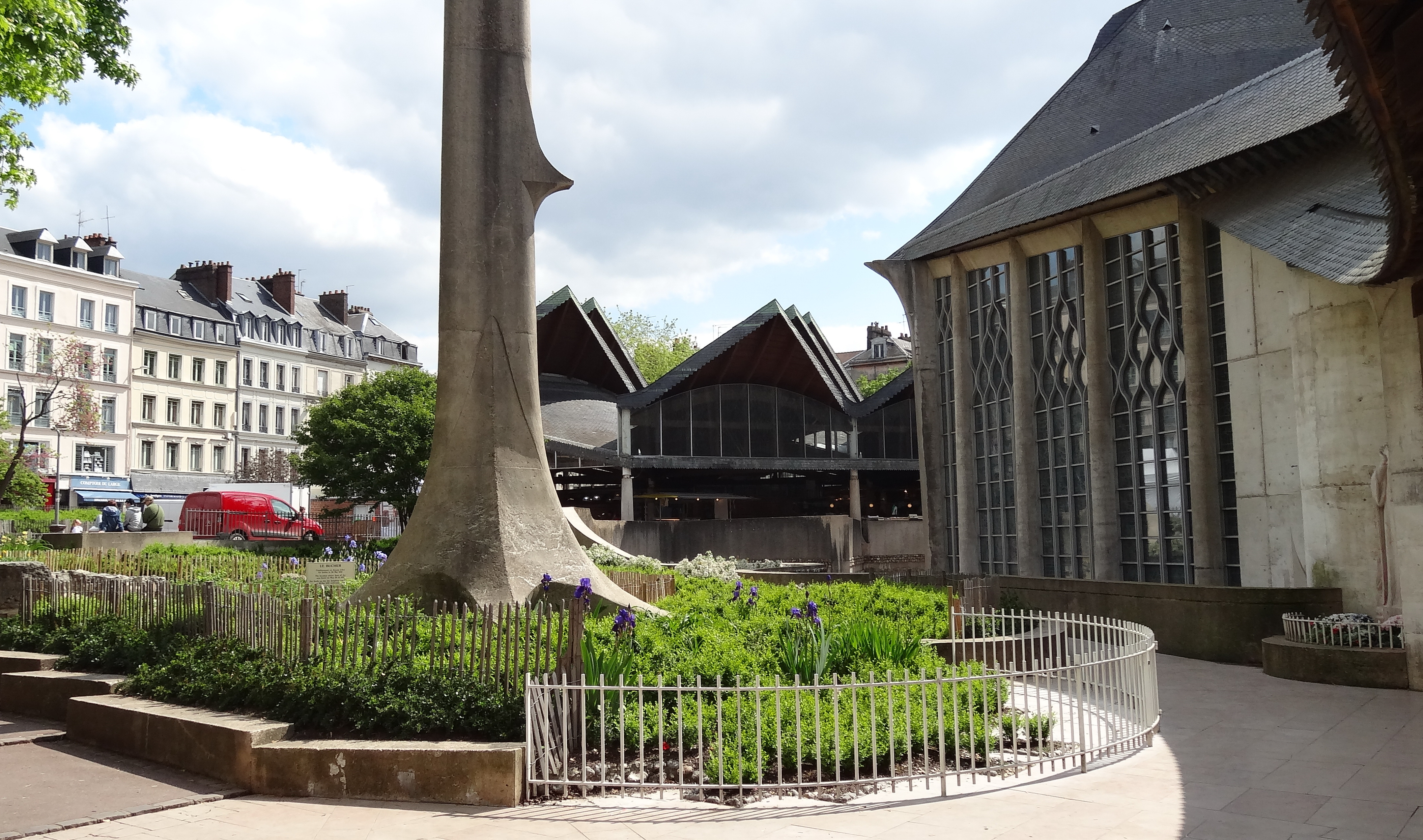 Place du Vieux-Marché de Rouen, La Croix Jeanne d'Arc (Haute-Normandie)